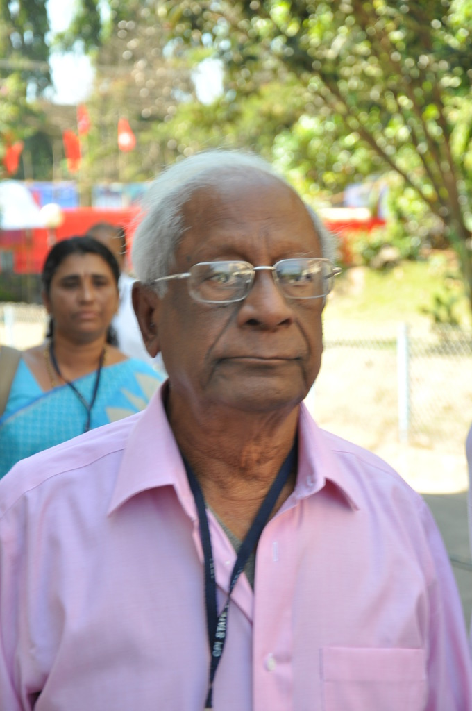 CPI NATIONAL GENERAL SECRETARY A.B.Bardan